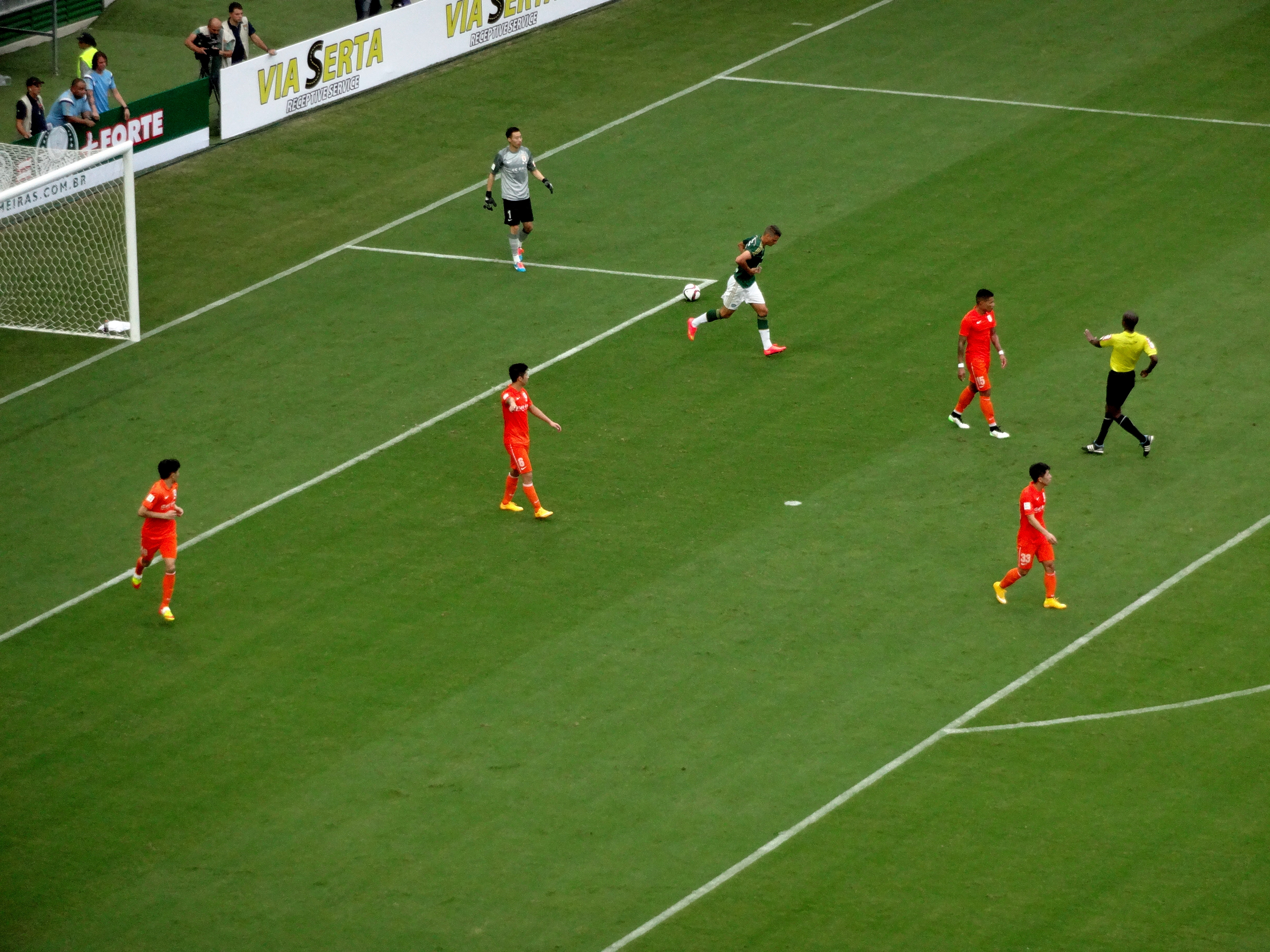 Palmeiras passa pelo Shandong Luneng e vence a primeira no Allianz Com gols marcados por Leandro Pereira, Lucas e Cristaldo, Verdão derrota time da China por 3 a 1.